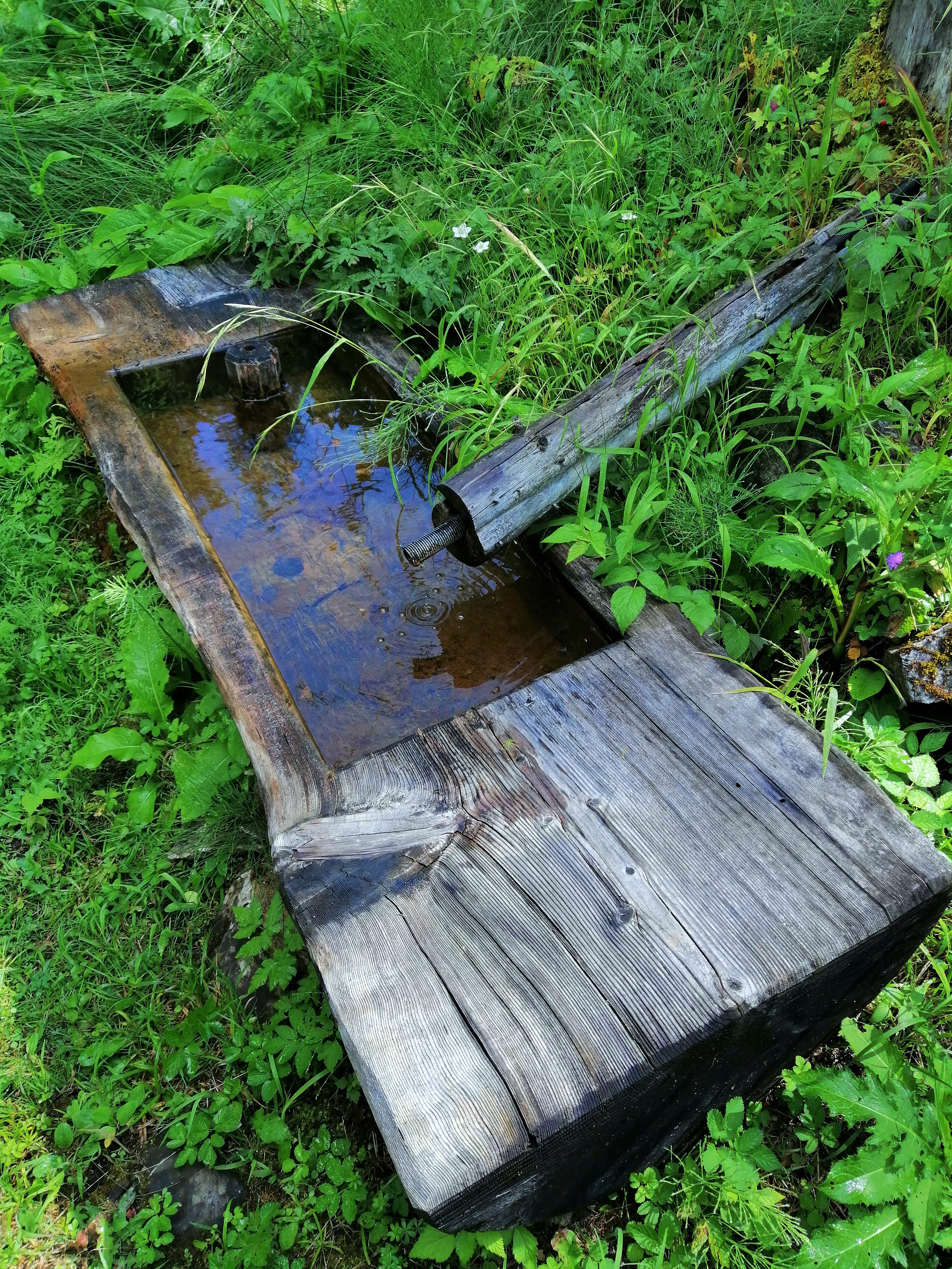 Bad Jenaz, Prättigau GR, Schweiz